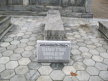 Oʻzbekcha/ўзбекча: Yalangto'sh Bahodirning qabri yoniga qo'yilgan toshtaxta